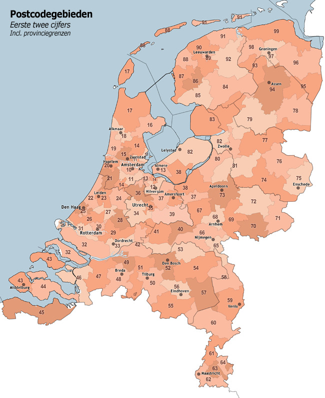 Postcodegebieden in Nederland (eerste twee cijfers), bron: "PC2" Shapefiles van TNT Post - gegeneraliseerd en vrij te gebruiken t/m 2 cijfers. Niet bruikbaar voor juridische zaken.